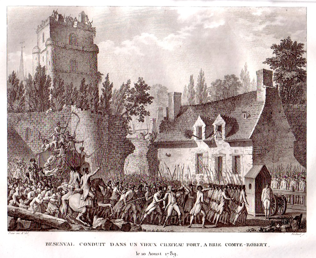 Mise en prison de Pierre Victor de Besenval de Brünstatt à Brie-Comte-Robert.